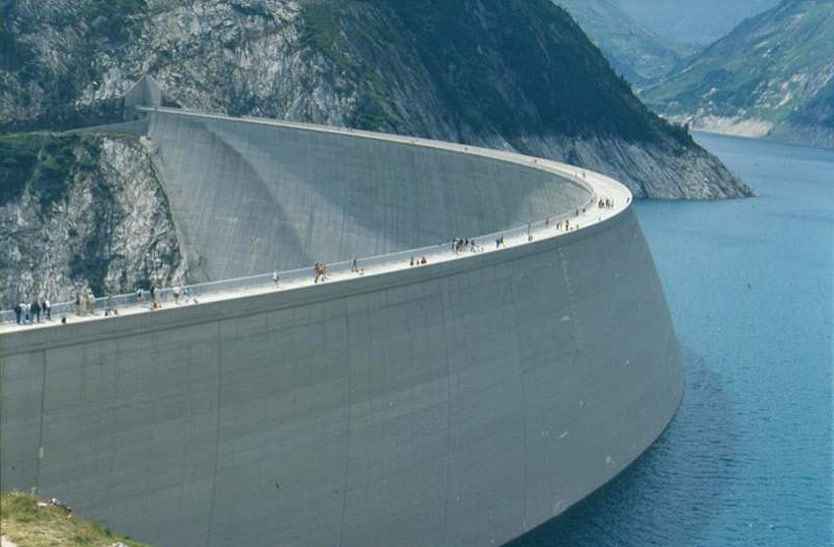 Kölnbreinspeicher in Österreich